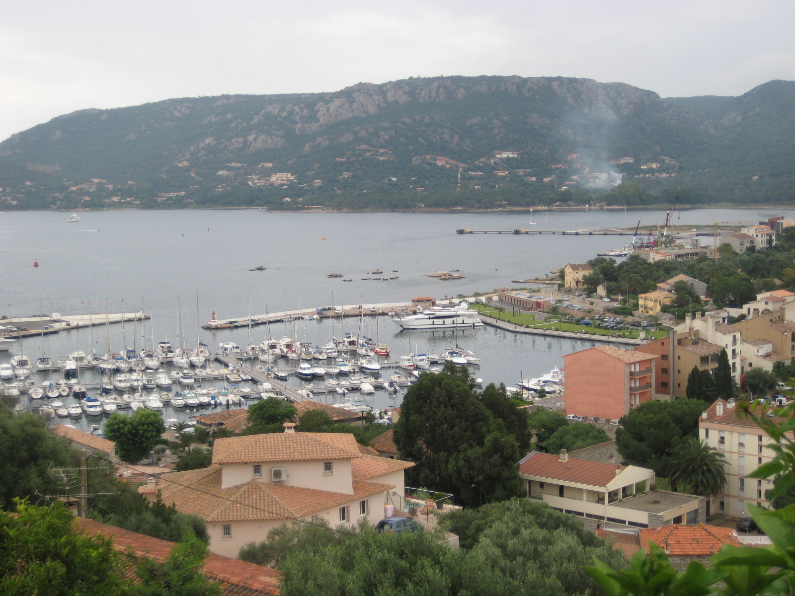 Porto-Vecchio Harbour